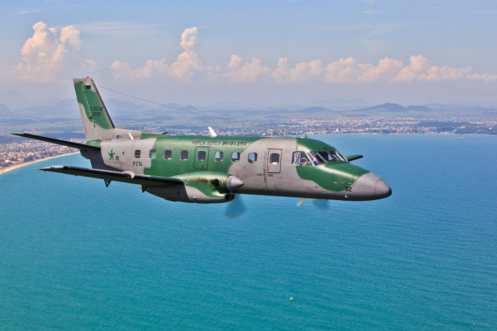 C-95CM, Bandeirante Modernizado